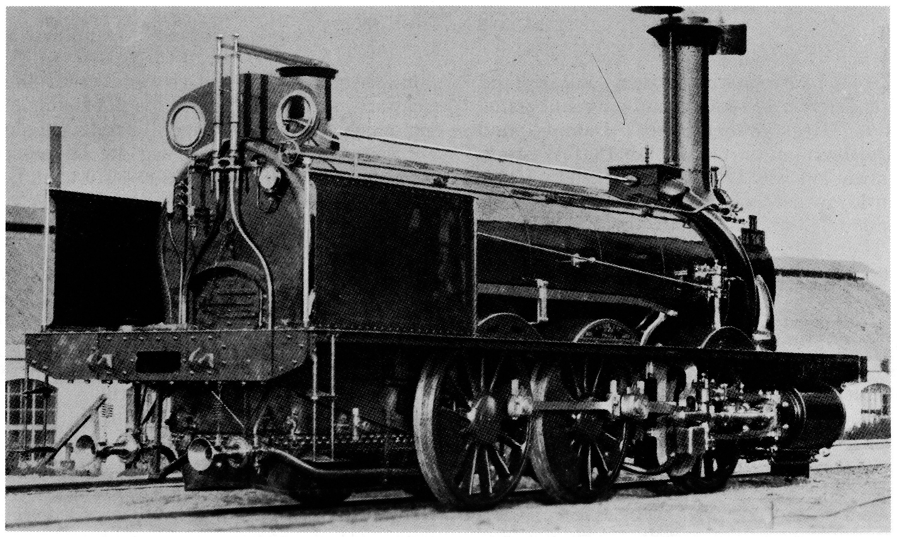 Güterzuglocomotive C3T La Vaux, gebaut 1858 von J. F. Cail & Cie. zů Paris (Fabricationsnr. 658) für die Compagnie de l’Oueſt-Suisſe (Betribsnr. 1), 1866 an die Betribsgmeinſchafft Chemins de fer de la Suisſe Occidentale (Betribsnr. 51, ab 1871 Nr. 101), 1881 an die Suisſe-Occidentale-Simplon, 1889 mit neuem Keſſel ausgeſtattet, 1890 als Nr. 501 an die Jura–Simplon-Bahn, 1903 als D 3/3 Nr. 3351 von den Schweizeriſchen Bundesbahnen übernommen, 1916 an die Deutſche Heeresbahn, Abbruchjahr unbekannt.